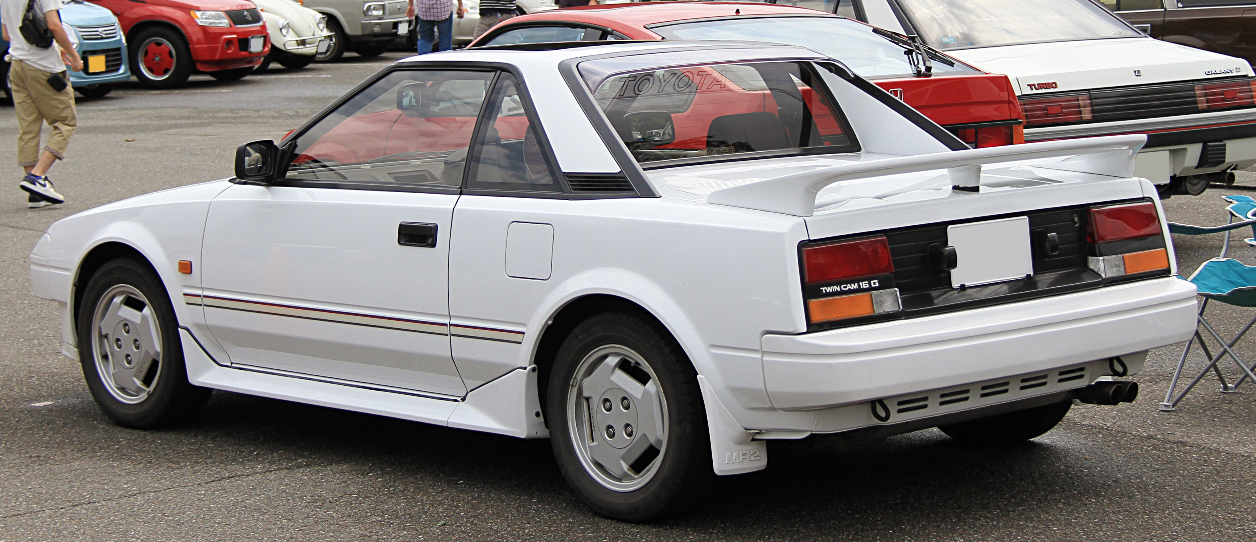 Toyota MR-2